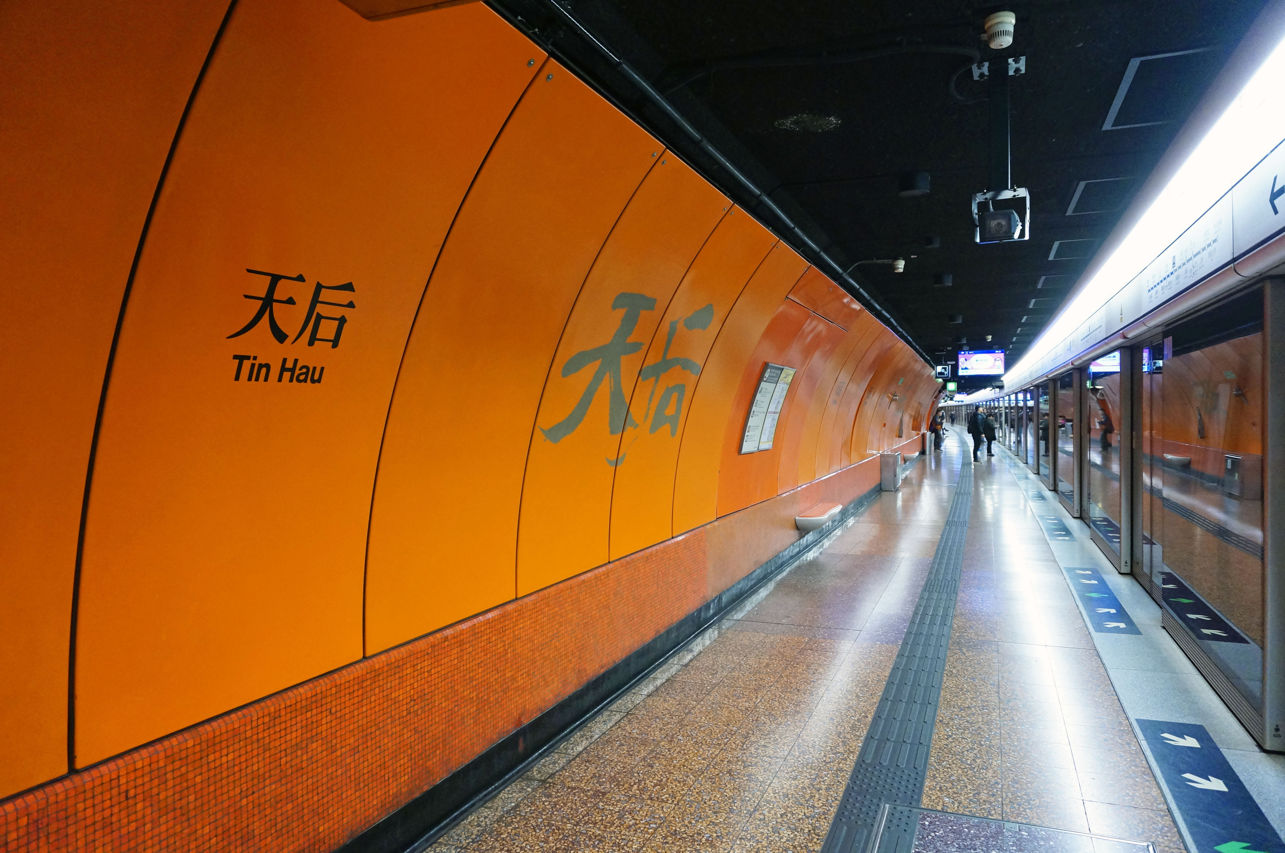 港鐵天后站月台